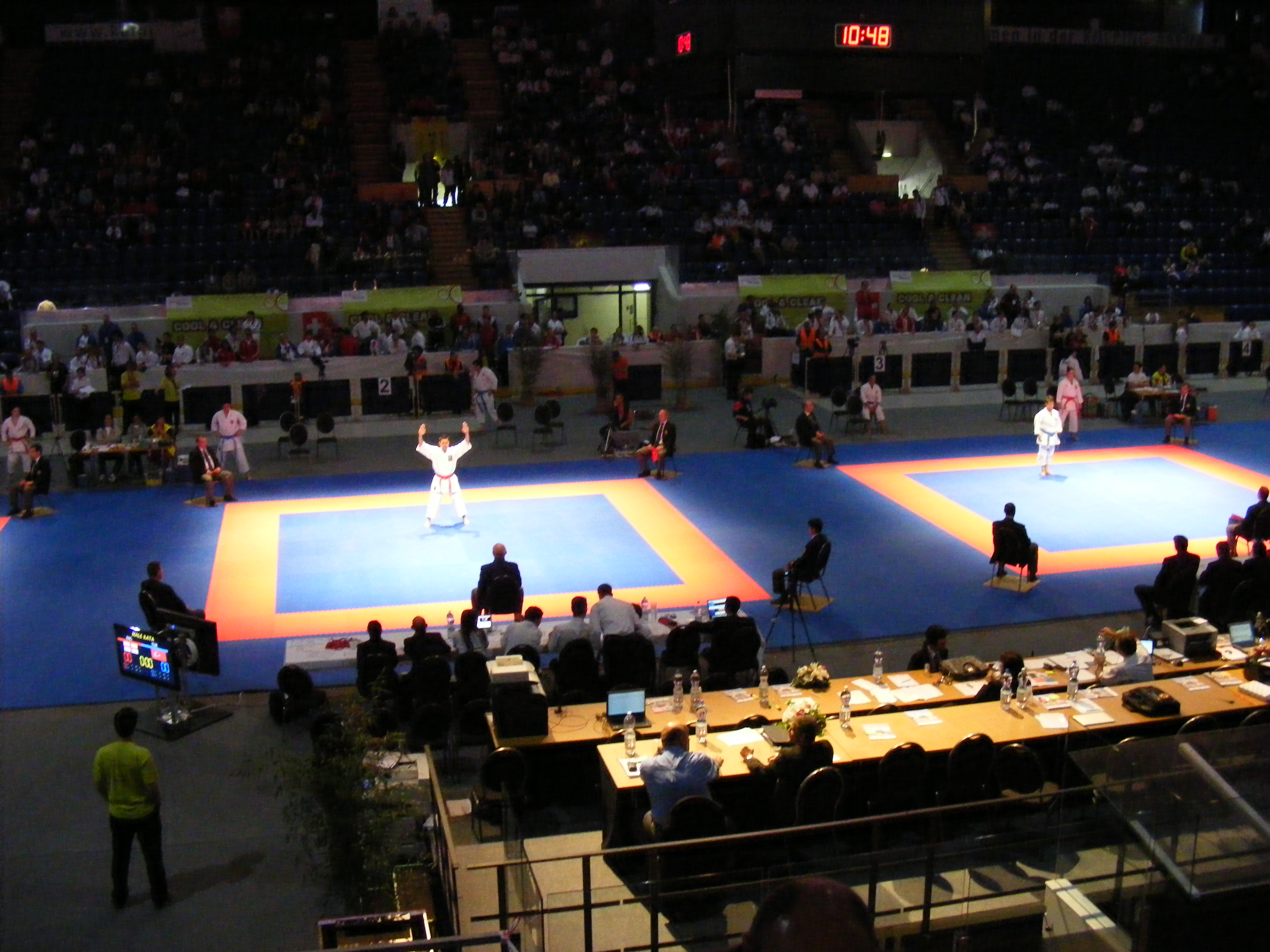 Kata Wettkampf bei der EM 2011